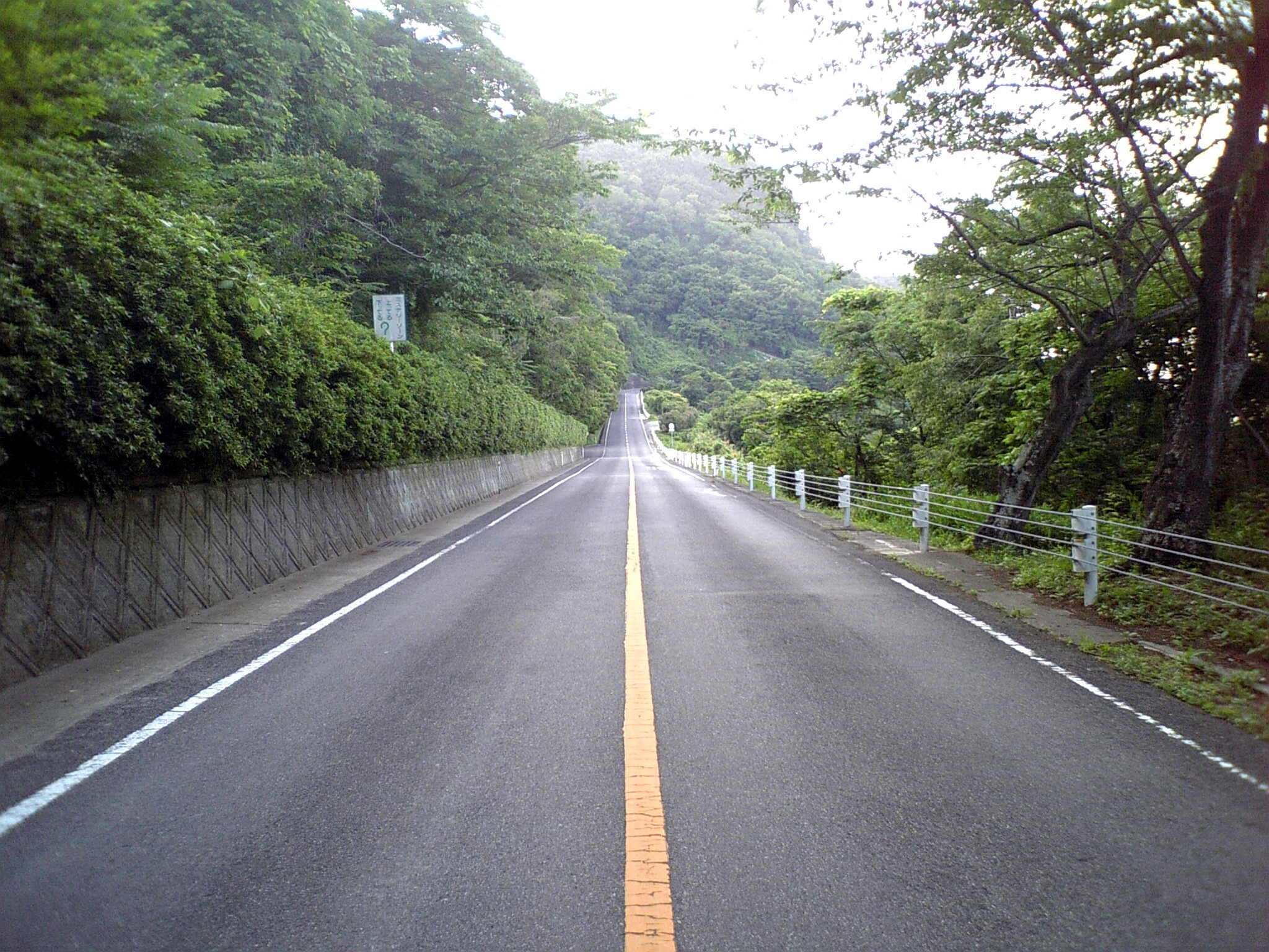 屋島ドライブウェイ途中にあるミステリーゾーン。奥に向かって下っているように見えるが、実際は上っている。